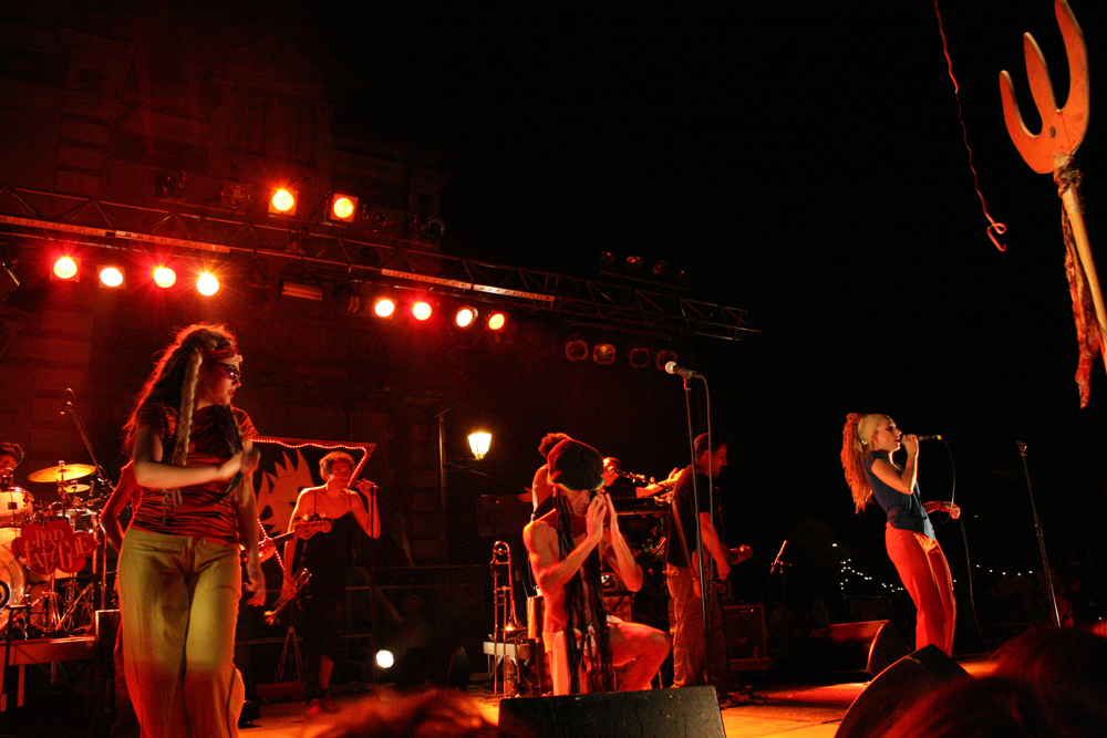 Raoul Petite, groupe de rock agricole sophistiqué, en concert le 28 avril 2007 à L'Isle-sur-la-Sorgue, Vaucluse, France